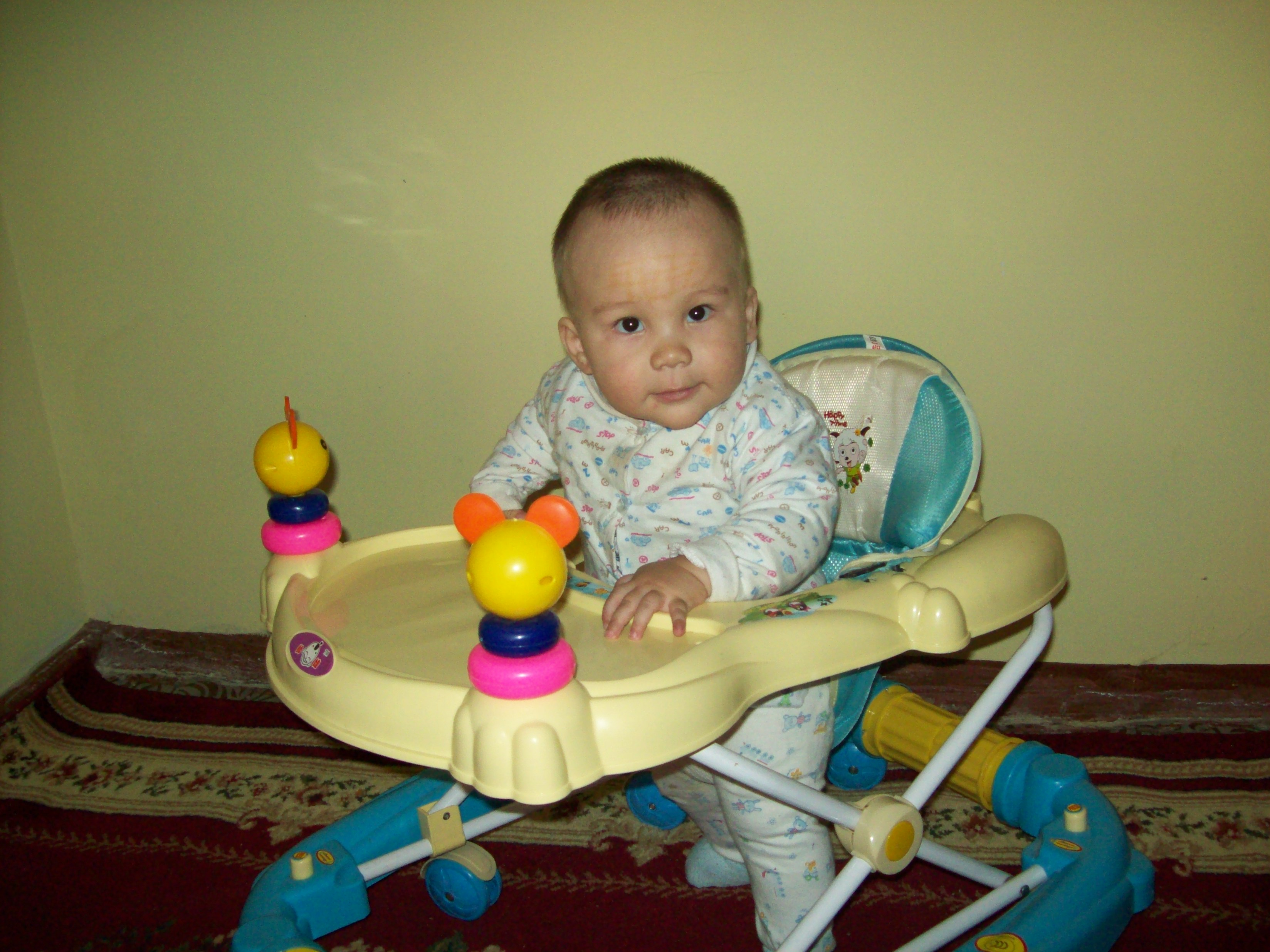 "Ходунок мой - иди со мной"